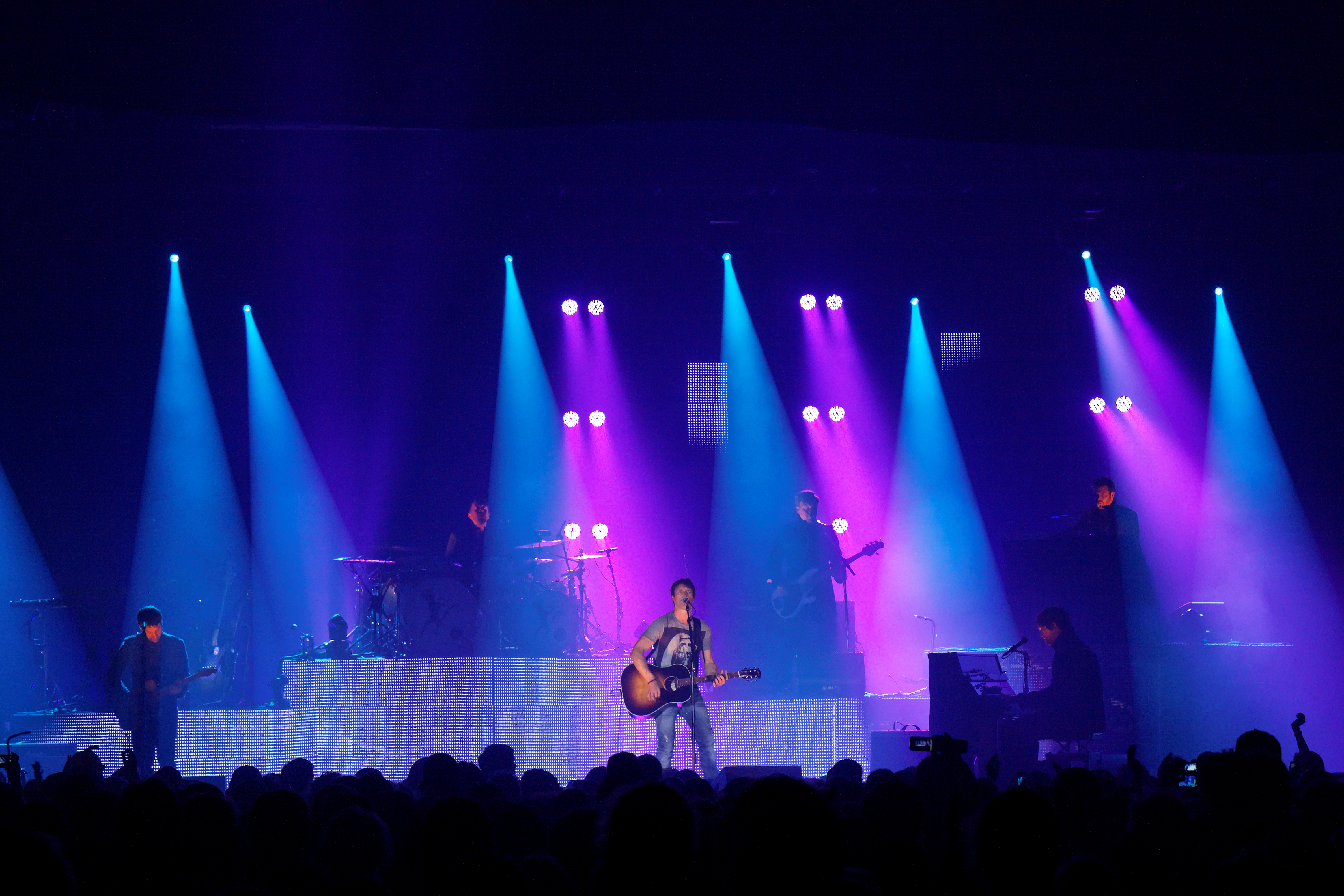 James Blunt en concert le 19 juillet lors du festival de Cornouaille 2011.